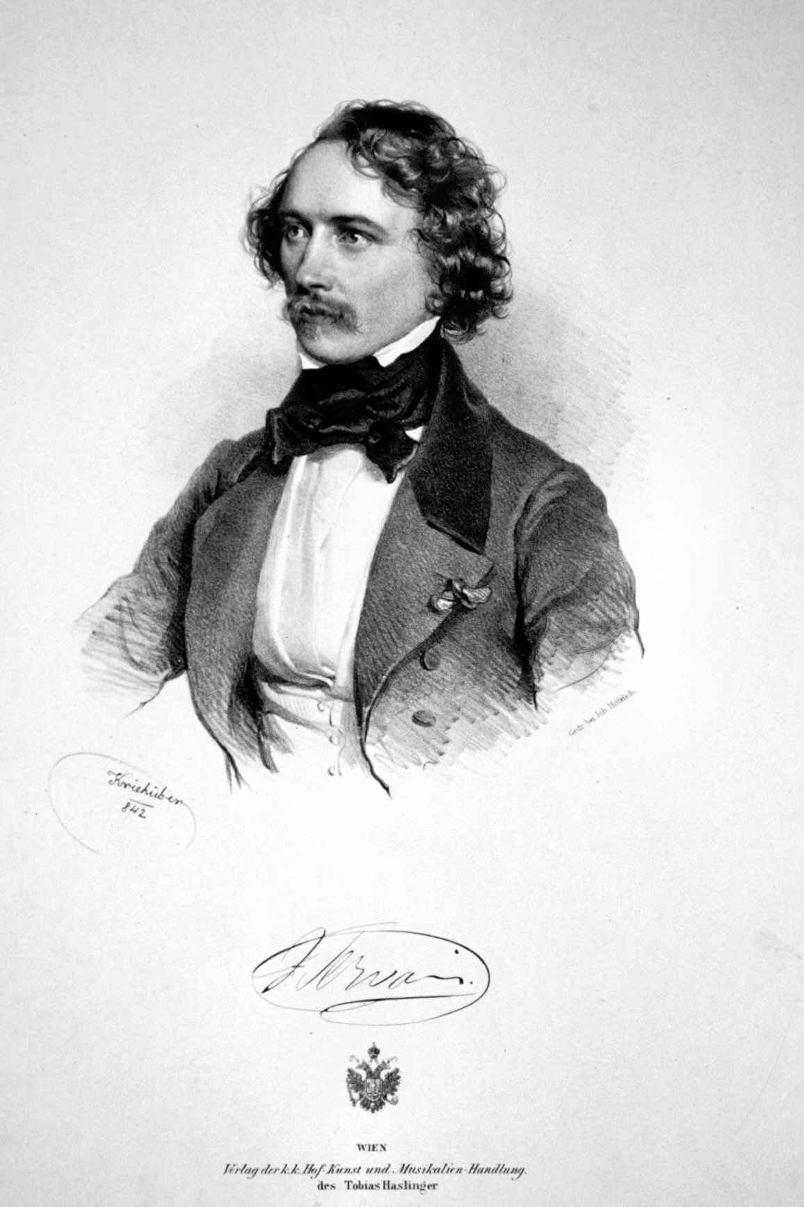 Franz Adrian Servais, Lithographie von Josef Kriehuber, 1842